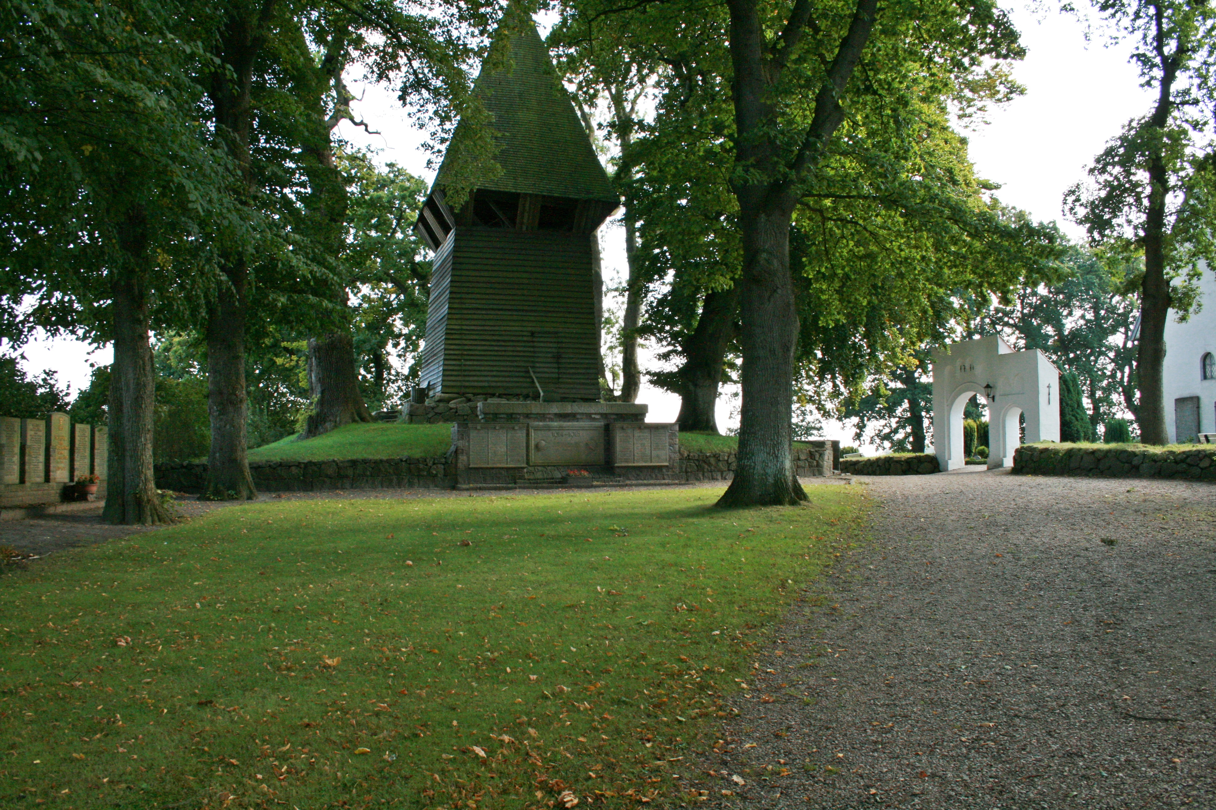 Der hölzerner Glockenturm (Glockenstapel) in Ulsnis, rechts das östliche Eingangstor zum Friedhof aus dem Jahr 1761 - Aufnahme vom September 2007.